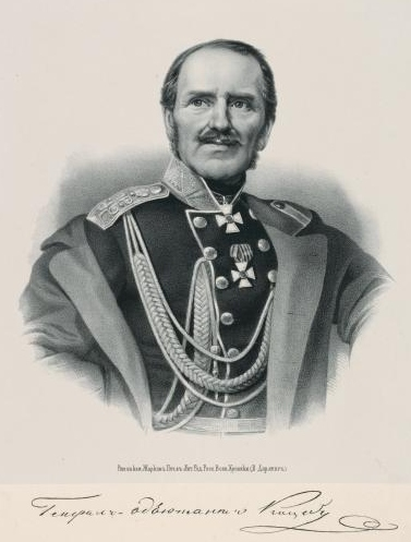 Paul Demetrius von Kotzebue (en russe: Павел Евстафьевич Коцебу, Pavel Evstafiévitch Kotzebue) 1808-1884